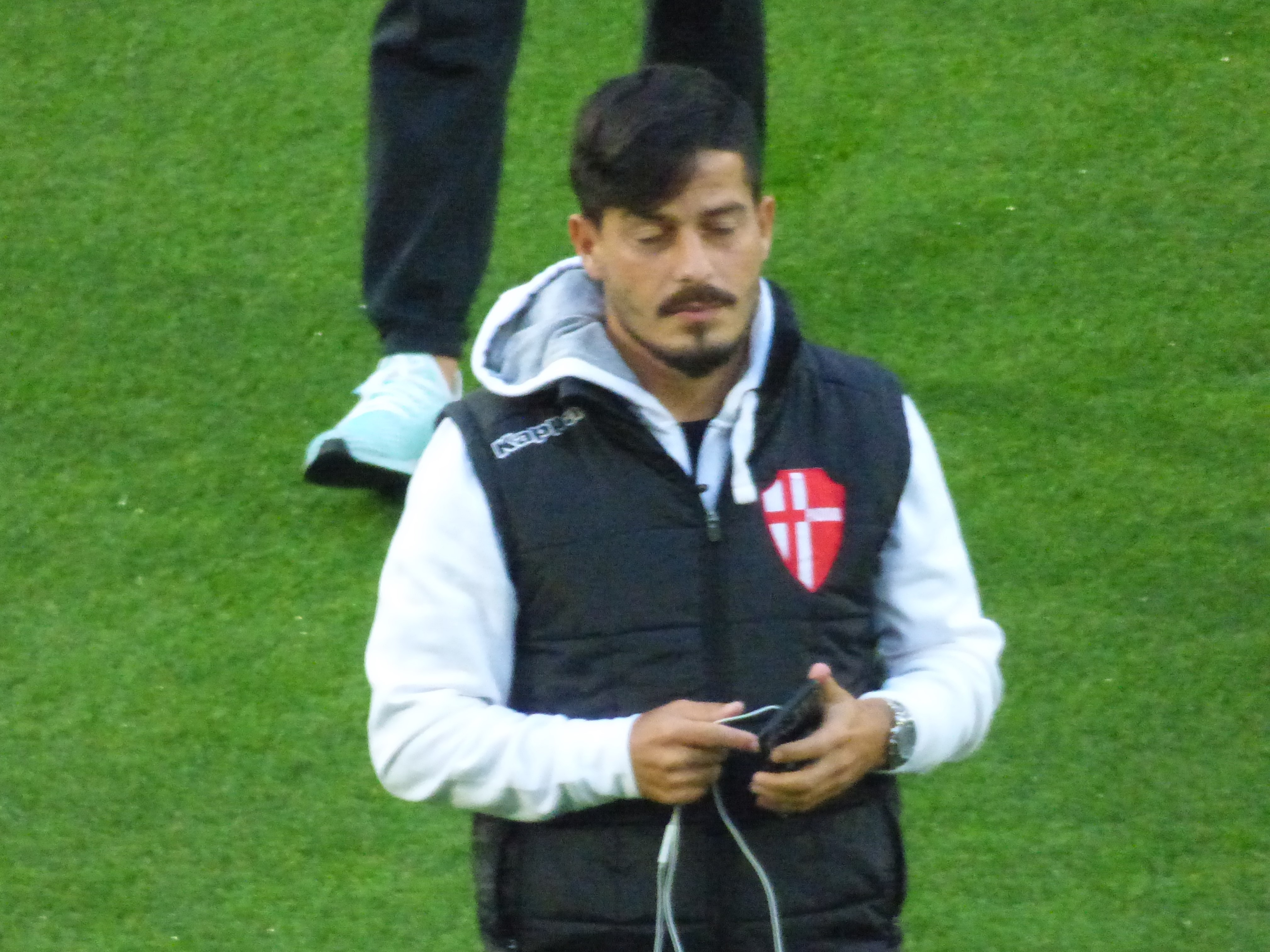 Vincenzo Sarno lors du match amical RC Lens - Calcio Padova, le 11 octobre 2018 au Stade Bollaert-Delelis de Lens.